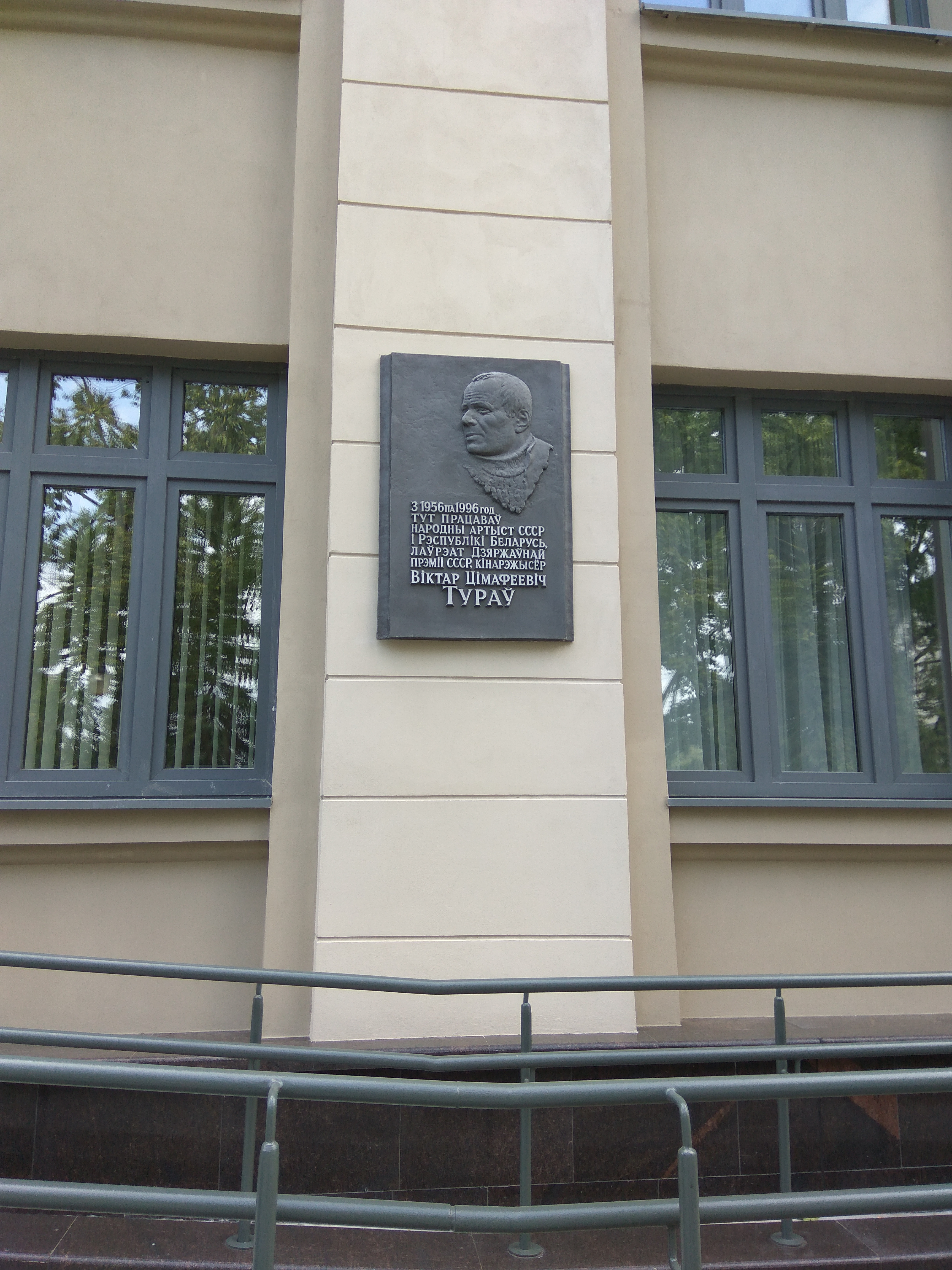 Мінск. Галоўны корпус Беларусьфільм. Дошка Віктару Тураву